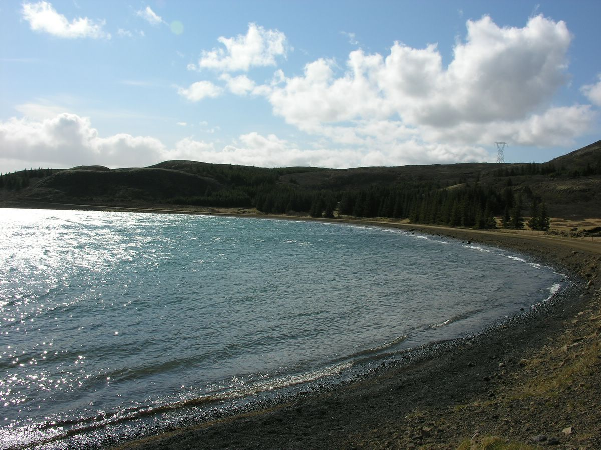 Iceland , Þingvallavatn